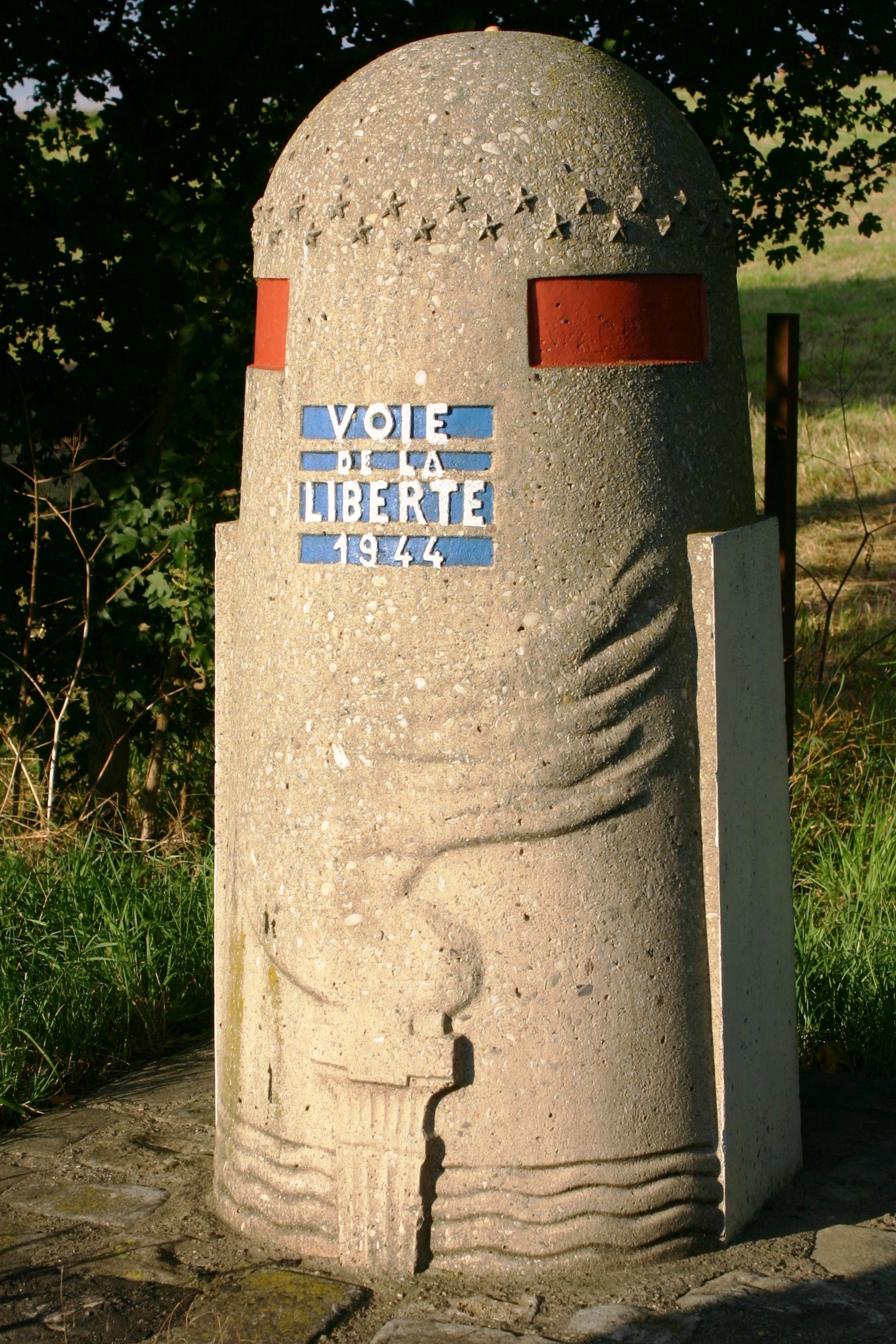 De Kilometersteen vun der Voie de la Liberté zu Fréiseng. D'Maark steet laanscht d'Nationale 3 op der rietser Säit direkt no dem Rond-Point wann ee vun der franséischer Grenz kënnt.